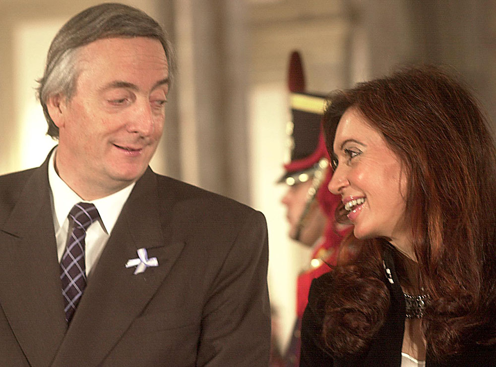 Casa Rosada - El expresidente Néstor Kirchner junto a su esposa y presidenta de Argentina desde el 10 de diciembre del año 2007, Cristina Fernández.